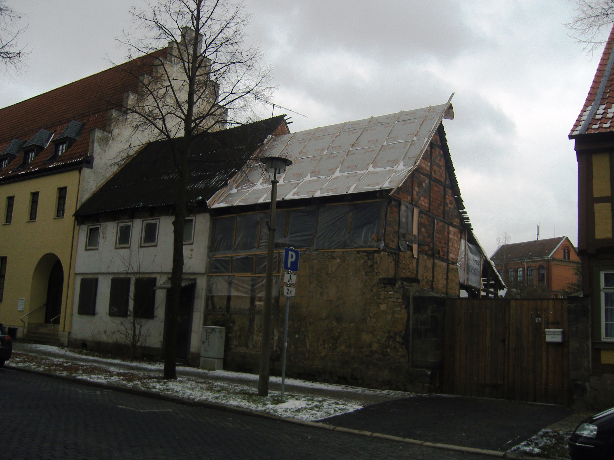 Denkmalgeschützter Ackerbürgerhof in der Weberstraße 18/18a in Quedlinburg